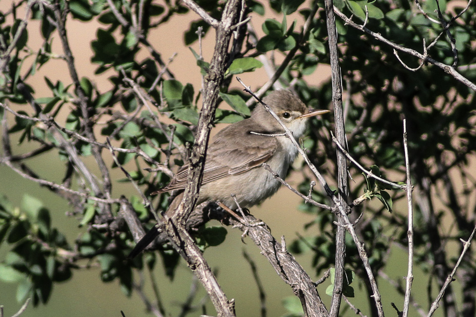 Upcher's Warbler Hippolais languida, Zeravshan Range, Samarkand, Uzbekistan